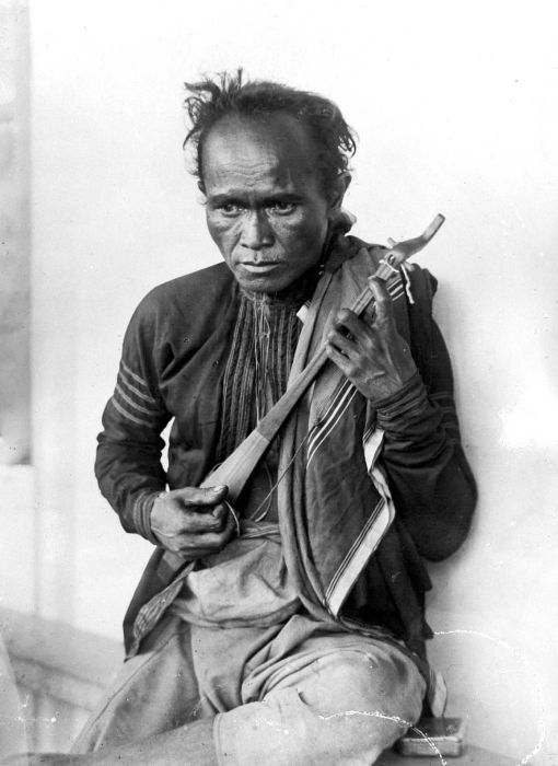 Repronegatief. De bekende mandolinespeler Si Datas van Soerbakti, Karolanden, Noord-Sumatra